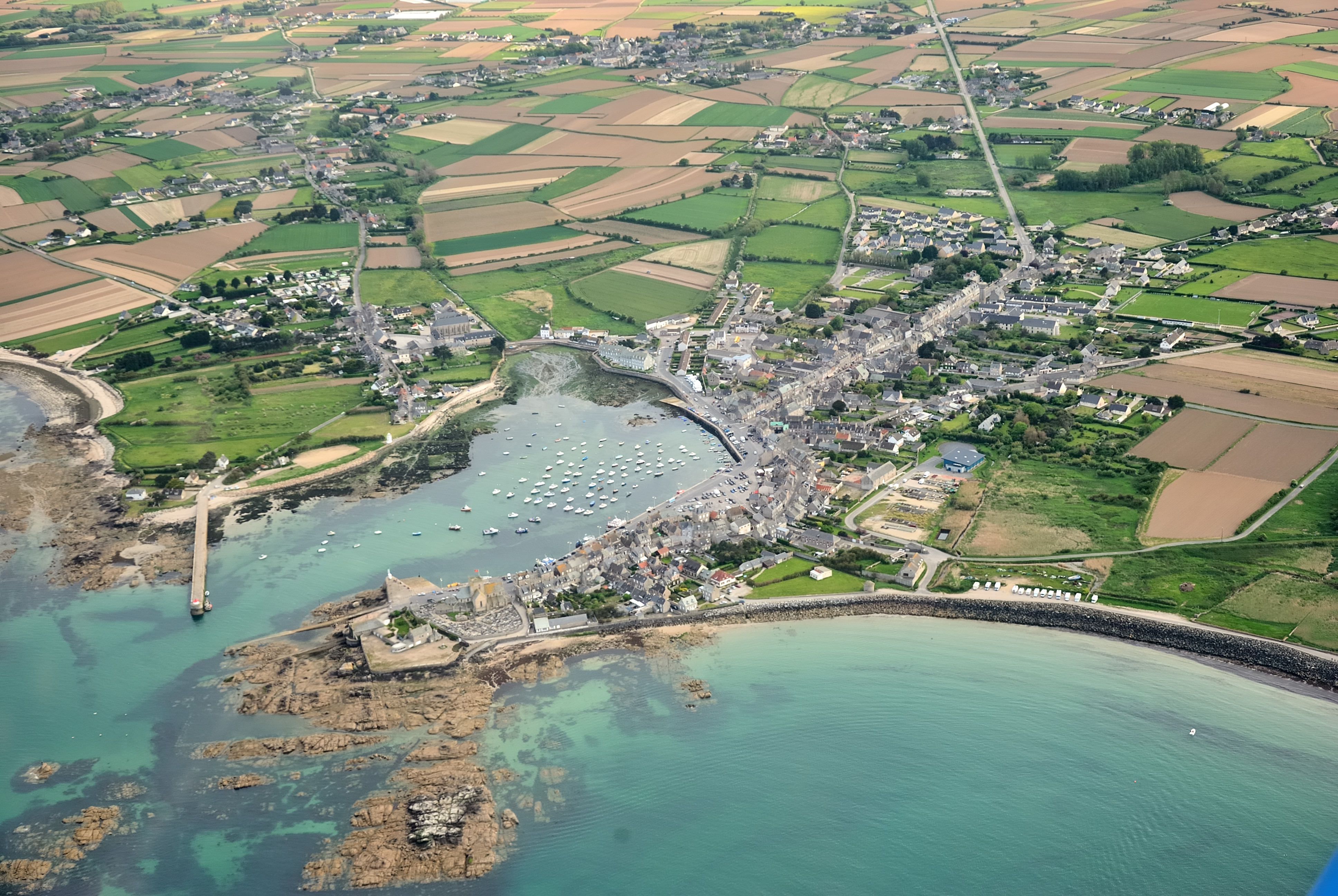 Barfleur, Manche, Basse-Normandie, France